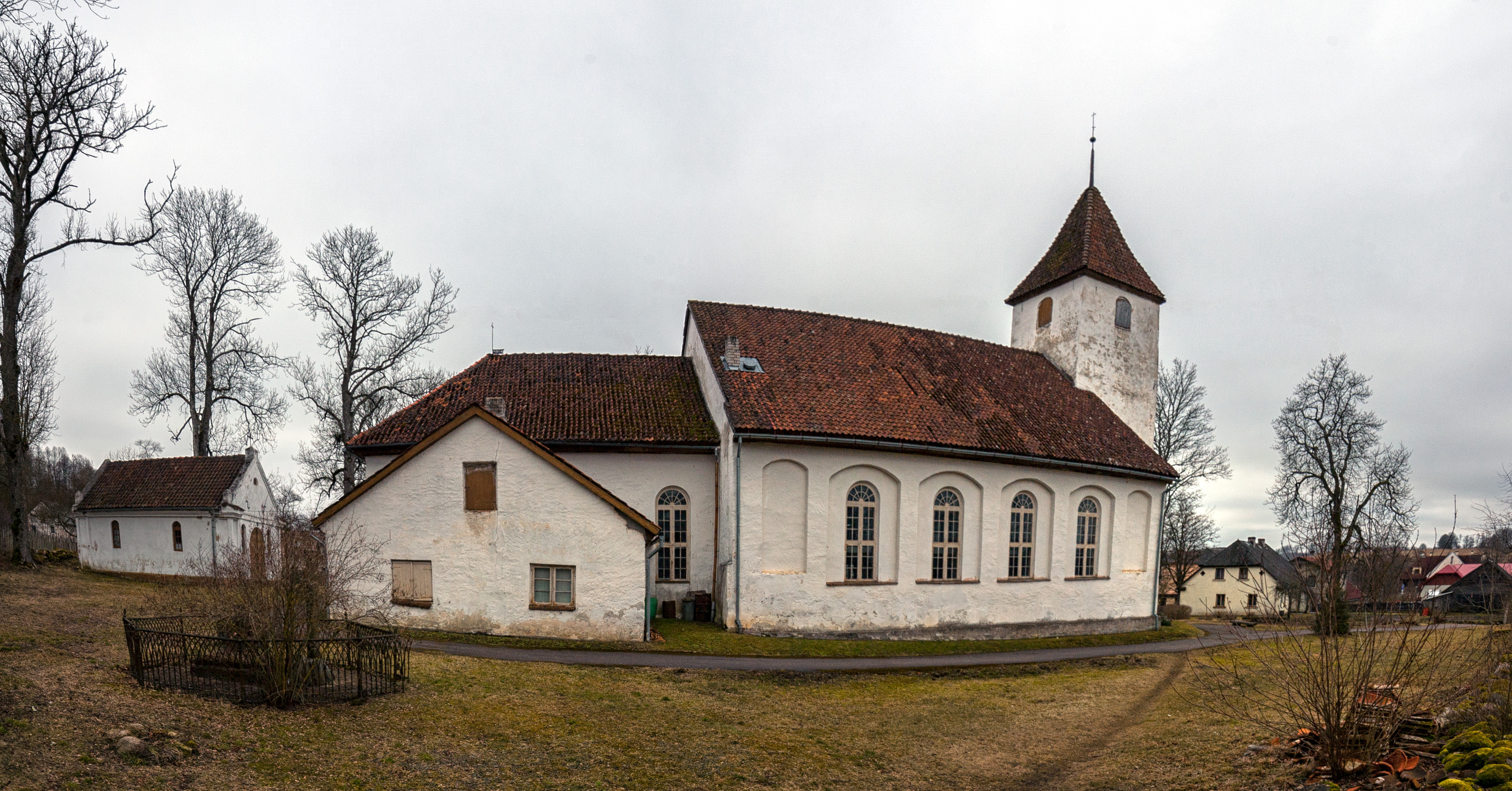 Sabiles luterāņu baznīca, Sabile, Ventspils iela 4/6